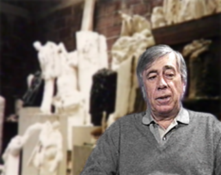 Portrait de Claude Abeille